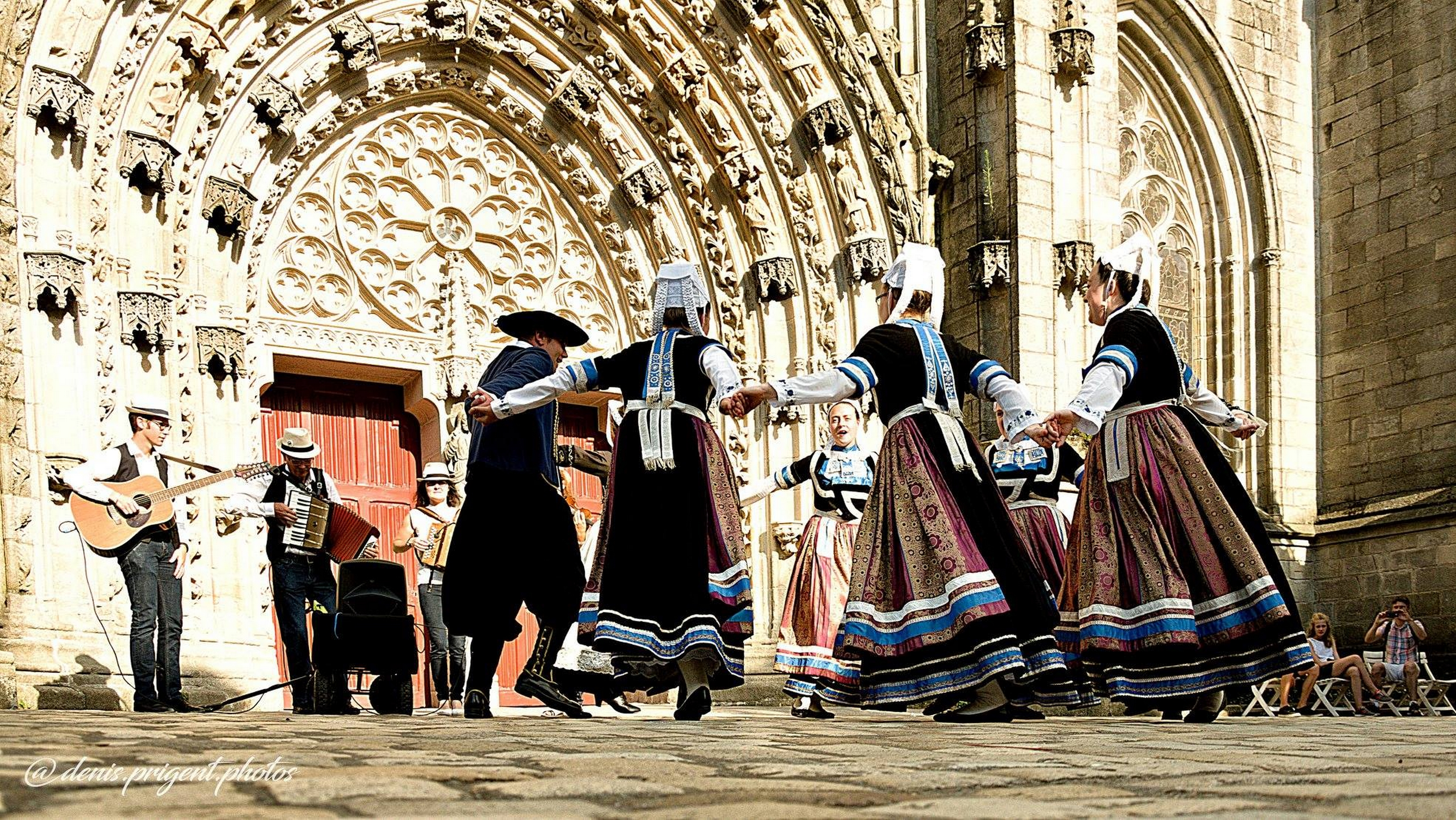 Les danseurs du cercle devant la cathédrale de Quimper, le 12 juillet 2018 lors d'une animation de danse. Photo Denis Prigent